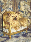 Dog's chair